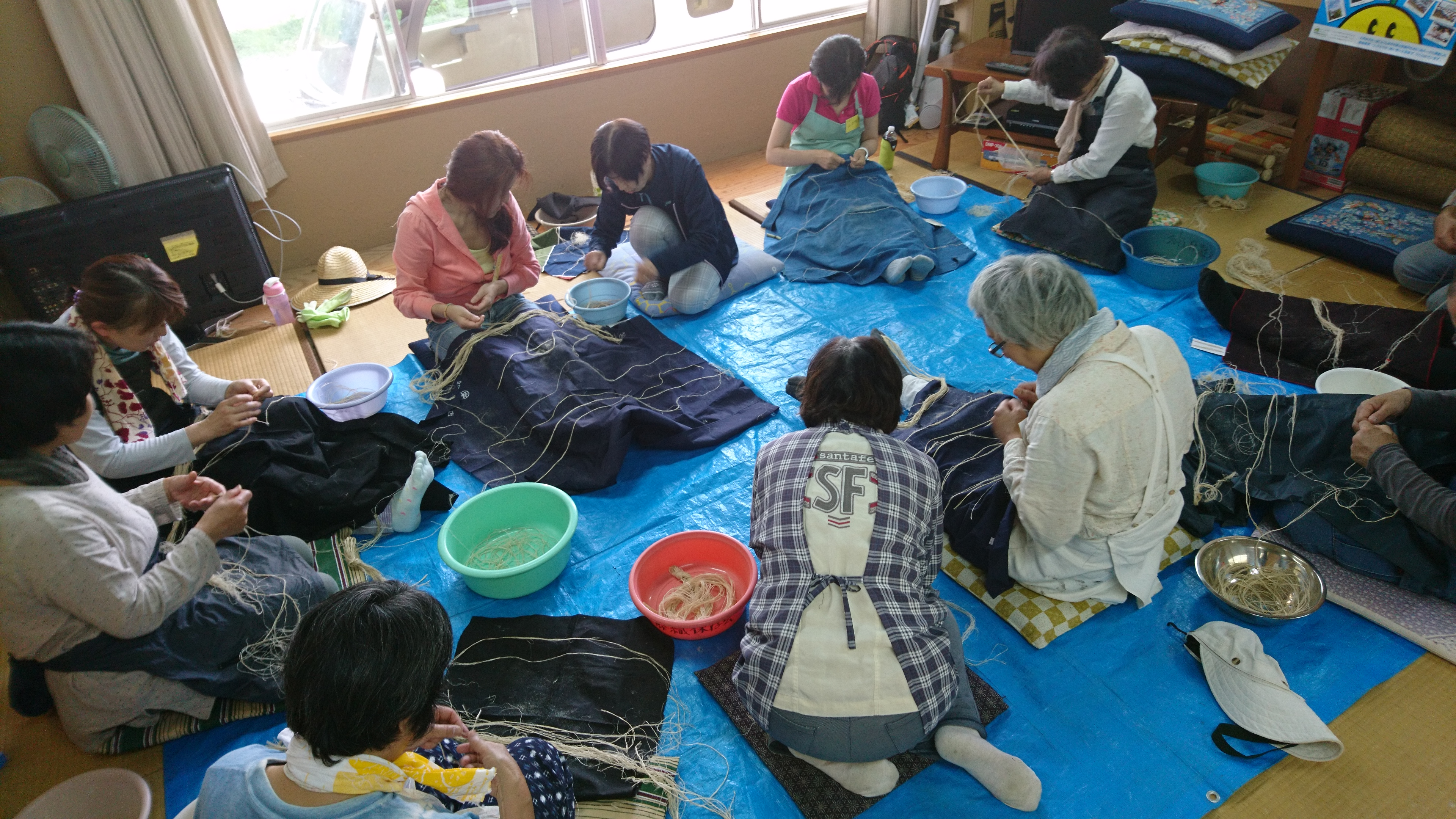 藤積みの様子（「丹後藤織り保存会」講習）